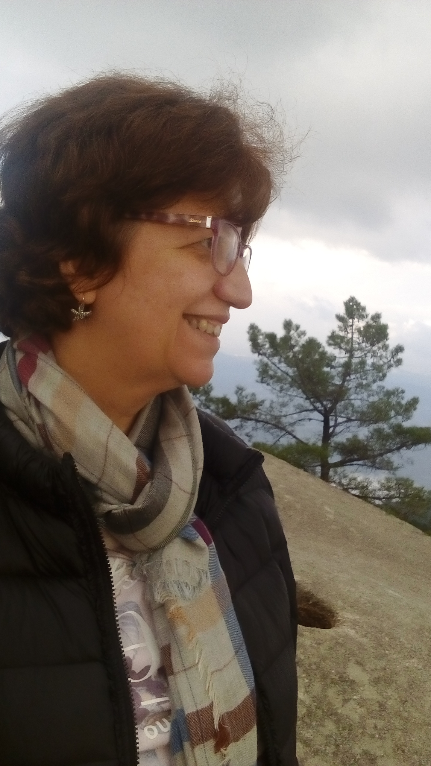 Raquel Vázquez Ramil en Galicia